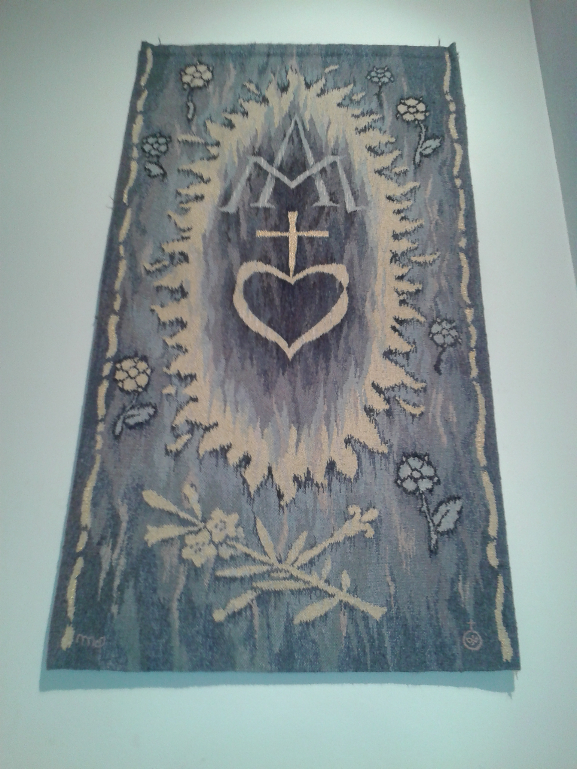 Située sur la côté amont de l'édifice. Artiste : Jean Parhin